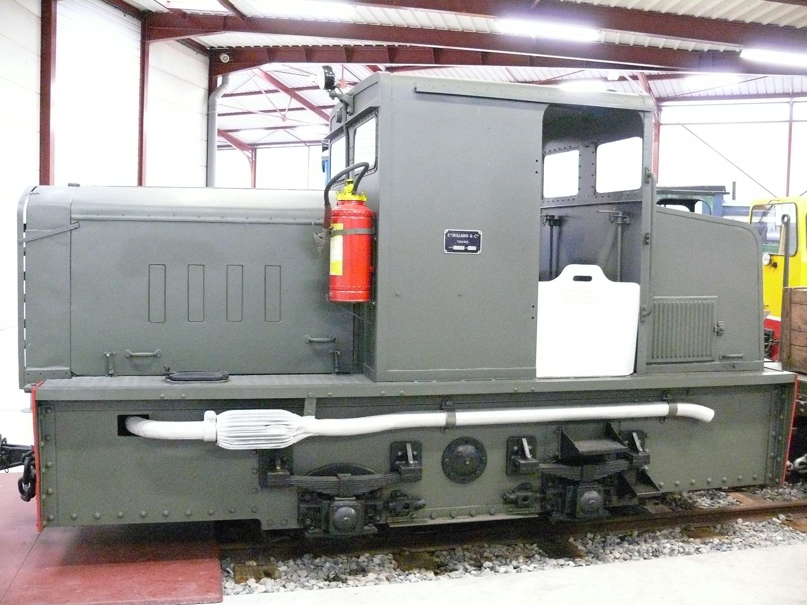 Locotracteur Billard type T75G à voie de 60 cm N° 232 conservé par l'APPEVA